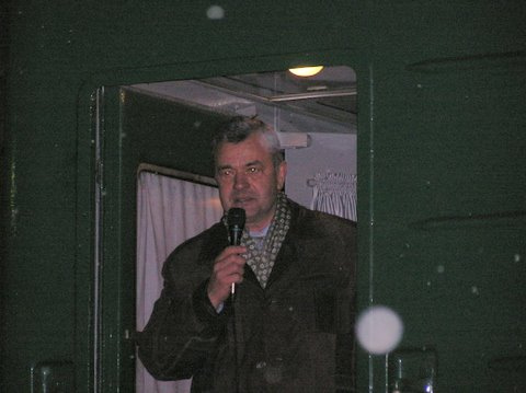 PB050117.JPG